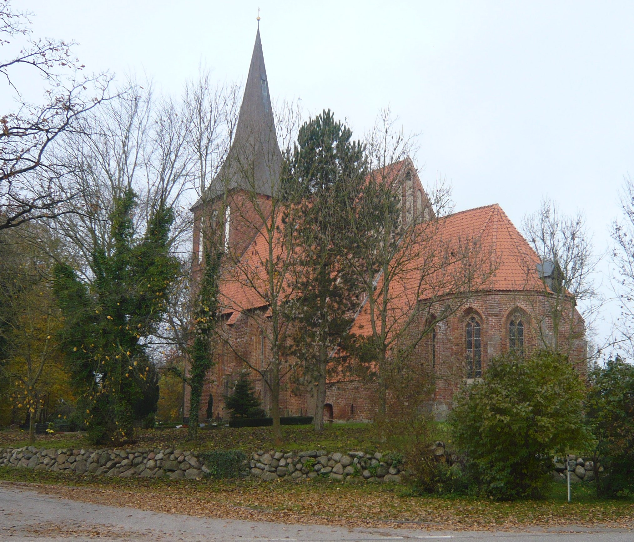 Ansicht der gotischen Kirche in Lüdershagen